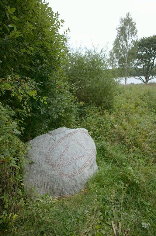 Inskriften på runblocket lyder: Holmsten reste (!) stenen efter Stenulv, sin farfader, en god bonde, som bodde i Brösicke. Gud bärge hans själ bättre än han förtjänade. Hallbjörn högg runorna på (stenen). Motiv: Sö195 Brösicke Nyckelord: Runor Kategori: Runristning/runsten Inskriften på runblocket lyder: Holmsten reste (!) stenen efter Stenulv, sin farfader, en god bonde, som bodde i Brösicke. Gud bärge hans själ bättre än han förtjänade. Hallbjörn högg runorna på (stenen).